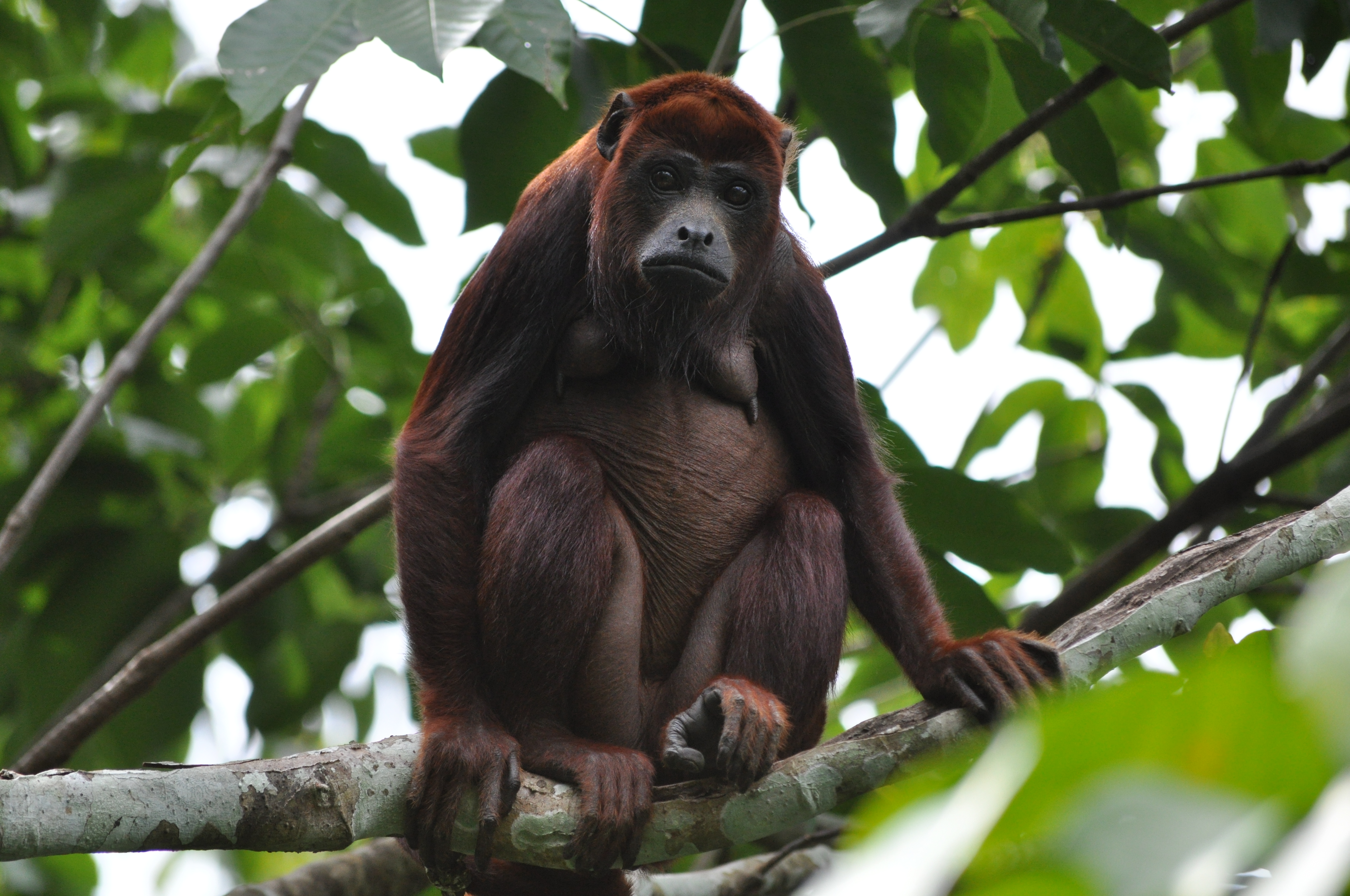 Macaco